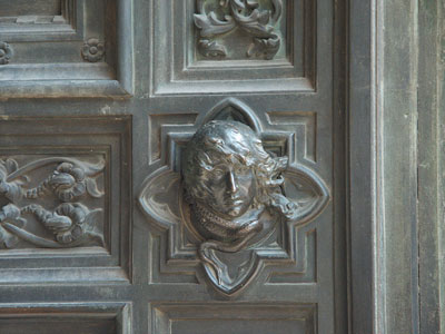 Palazzo del Paciarelli, piazza della Repubblica, Firenze.